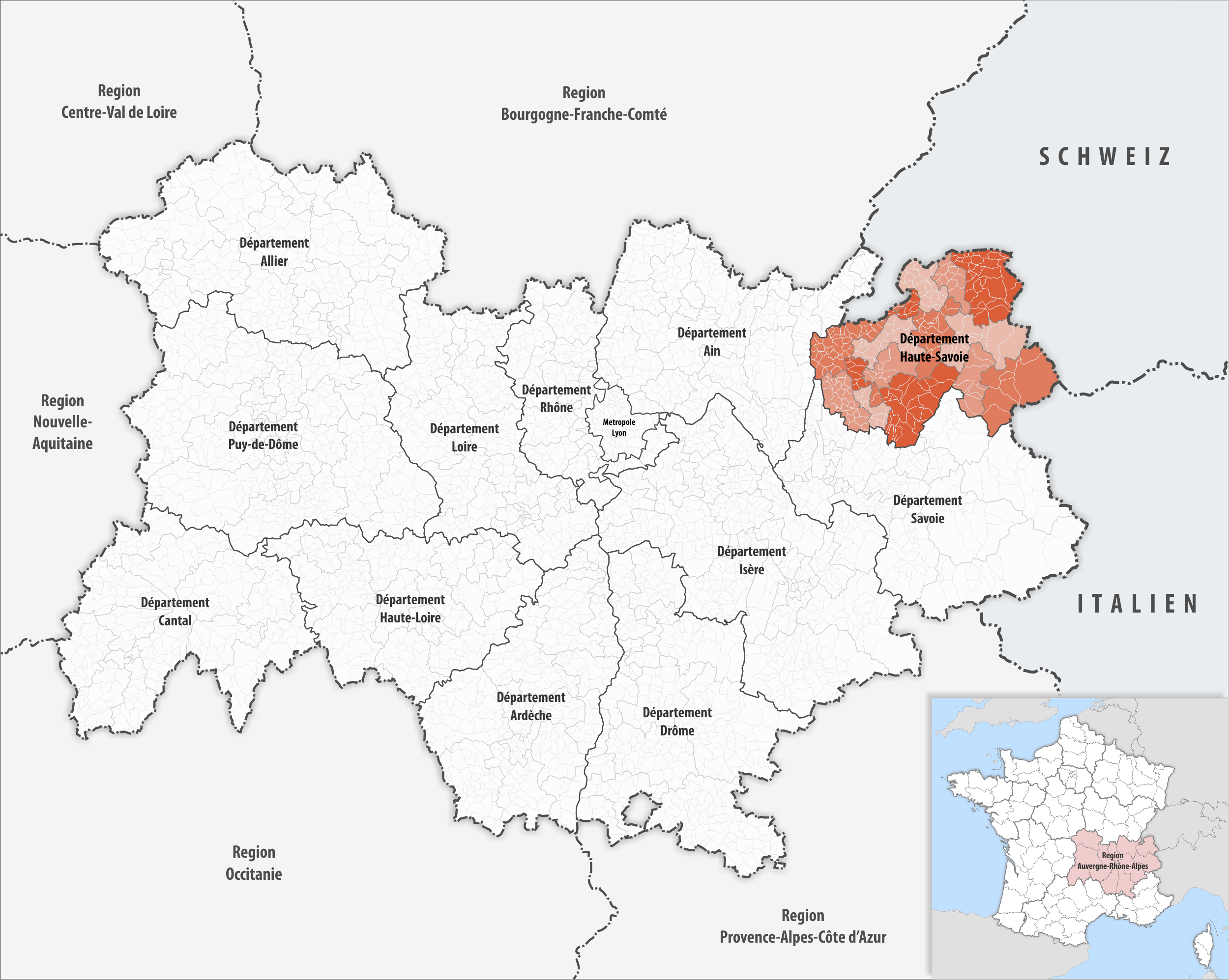 Lage des Departements Haute-Savoie